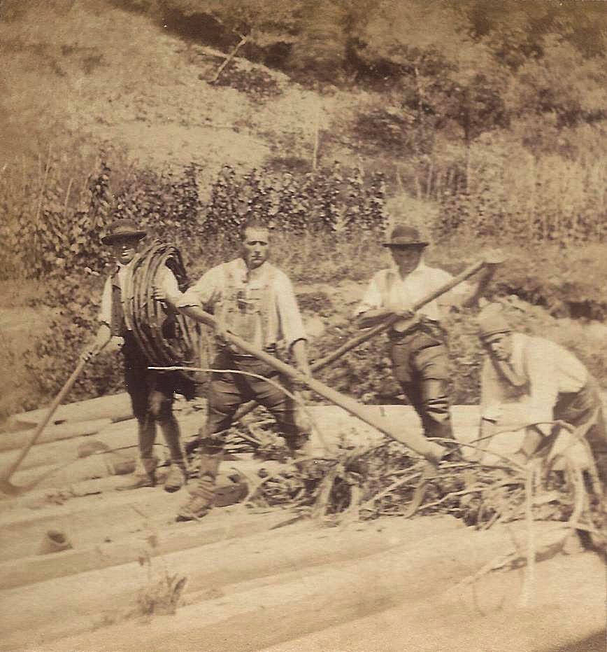 Linke Seite einer Sterokarte mit der Aufnahme N° 76 aus der Galerie universelle des Peuples von Ludovico Wolgang Hart: Flößer auf der Wolf (Baden) bei der Schwallung (Trift). 1864